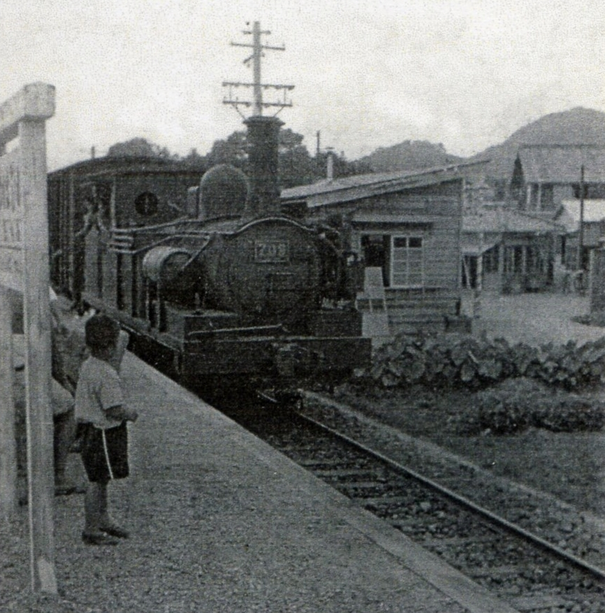 西幡豆駅に着いた709号貨物列車